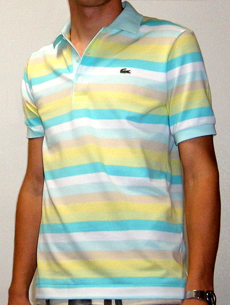 Lacoste tennis (polo) shirt ラコステポロシャツ（テニスシャツともいう）